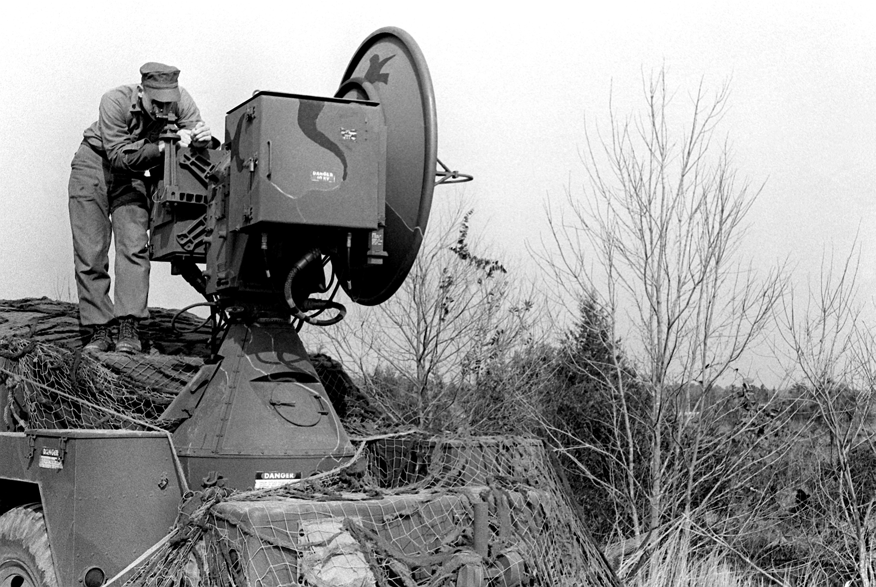 MIM-23 Hawk : SGT Richard Kiehue of A Battery, 3rd Light Anti-Aircraft Missile Battalion holds maintenance on the range only radar set (ROR).